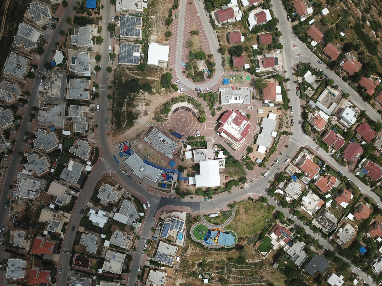 תצלום אווירי של היישוב נריה